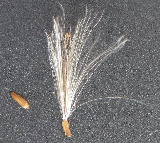 zelfgemaakte foto van de vrucht van de Akkerdistel Cirsium arvense; begin oktober